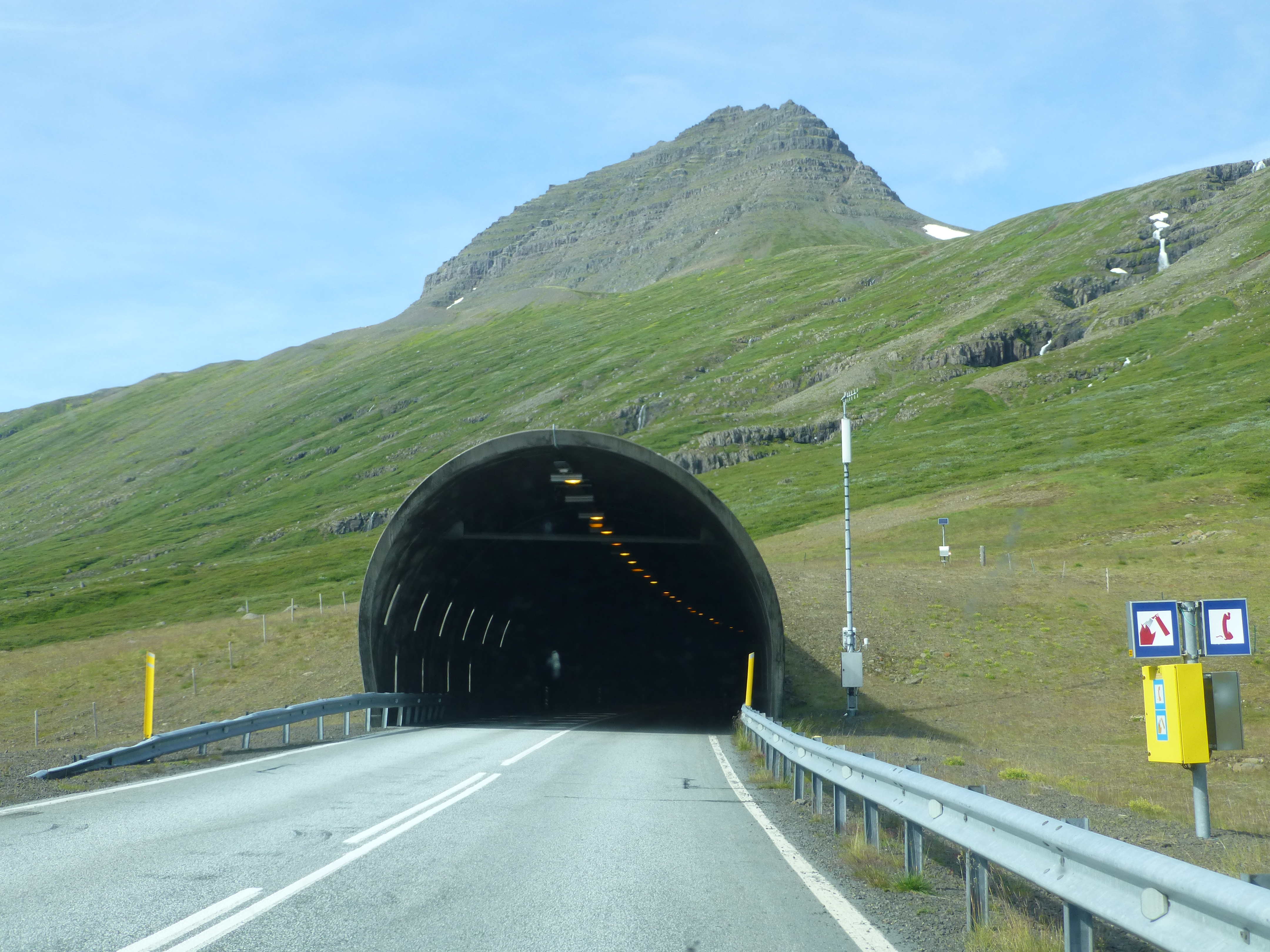 Tunnel am Suðurfjarðavegur